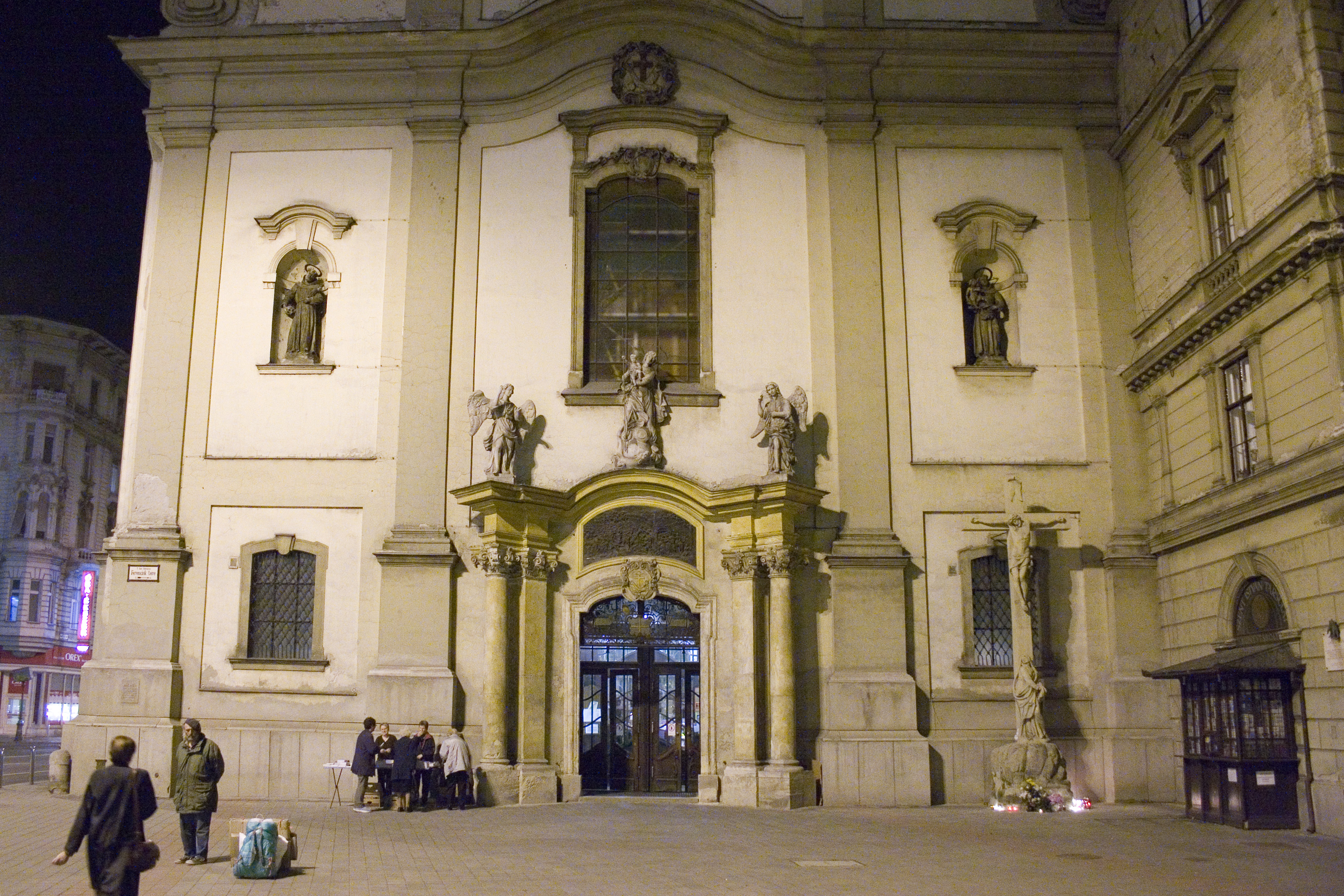 Ferences templom - 2008 advent idején. Feszület mellékalakkal. 1763. - Magyarország, Budapest, V. kerület, Ferenciek tere, A templom bejárata mellett jobboldalt áll.Inner City Franciscan Church. Baroque, crucifix, limestone in 1763 (right).